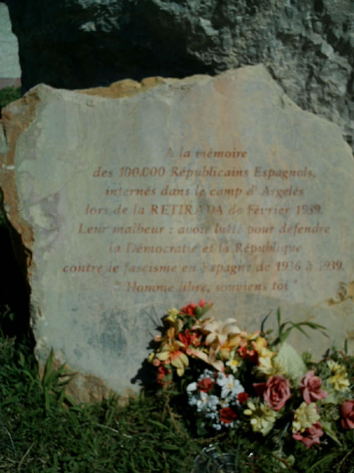 Inscripción en el monolito de la playa de Argelès-sur-Mer en el que se homenajea a los más de 100 mil españoles republicanos que estuvieron encerrados en el campo de concentración que el gobierno francés construyó en esta playa en 1939.